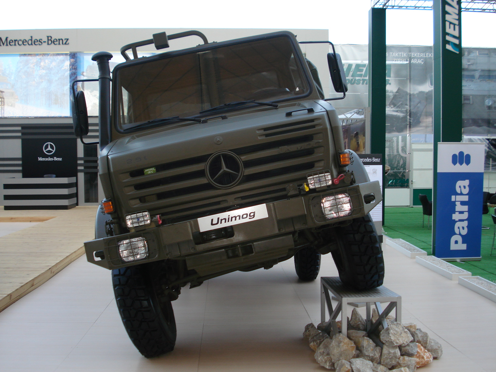 IDEF '07 Savunma Fuarı'nda çekildi.Mercedes Benz Unimog. 23 Mayıs 2007